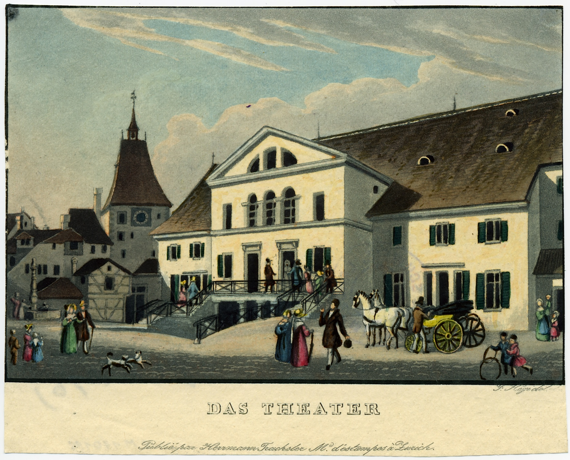 Aktientheater in der ehemaligen Kirche des Barfüsserklosters Zürich. Kolorierte Aquatinta von Franz Hegi, 1839